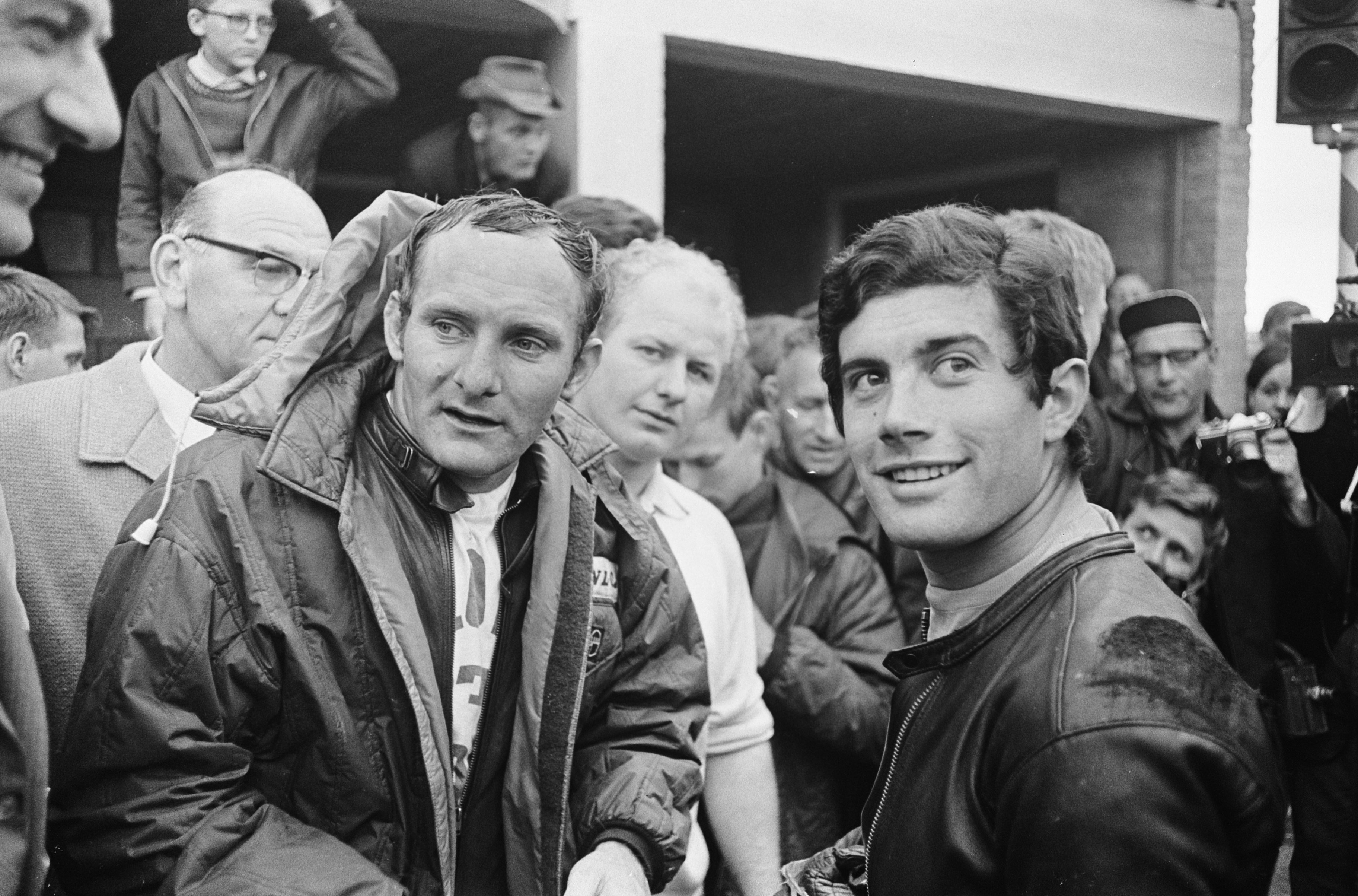 Collectie / Archief : Fotocollectie Anefo Reportage / Serie : TT Assen 1967 Beschrijving : Mike Hailwood en Giacomo Agostini in het rennerskwartier Datum : 24 juni 1967 Locatie : Assen, Drenthe Trefwoorden : coureurs, motorsport Persoonsnaam : Agostini, Giacomo, Hailwood, Mike Fotograaf : Fotograaf Onbekend / Anefo Auteursrechthebbende : Nationaal Archief Materiaalsoort : Negatief (zwart/wit) Nummer archiefinventaris : bekijk toegang 2.24.01.05 Bestanddeelnummer : 920-4321